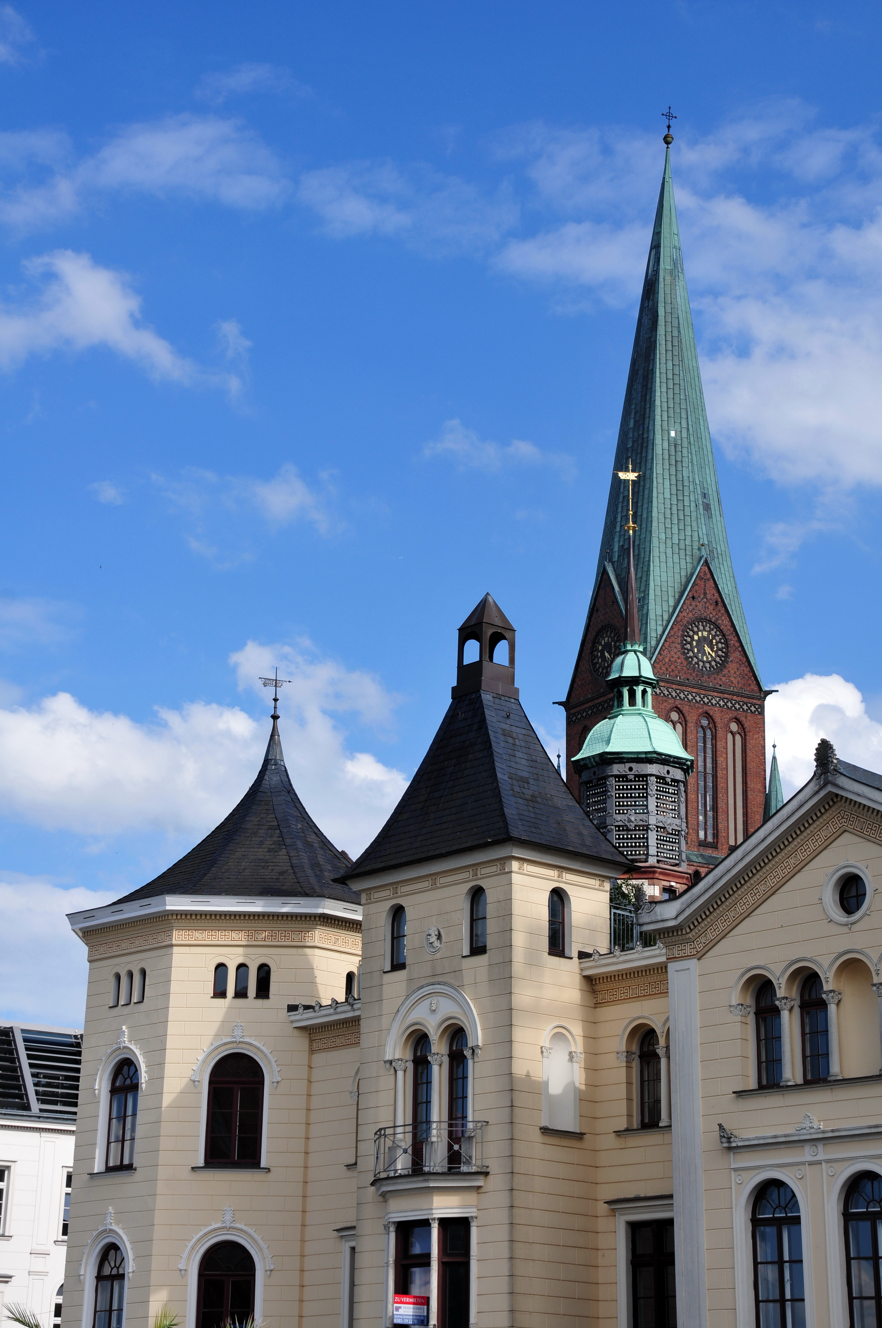 Schwerin; mit 50mm Brennweite von der Orangerie zum Bahnhof und noch einmal der Dom